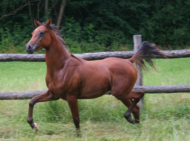 arabsky kon